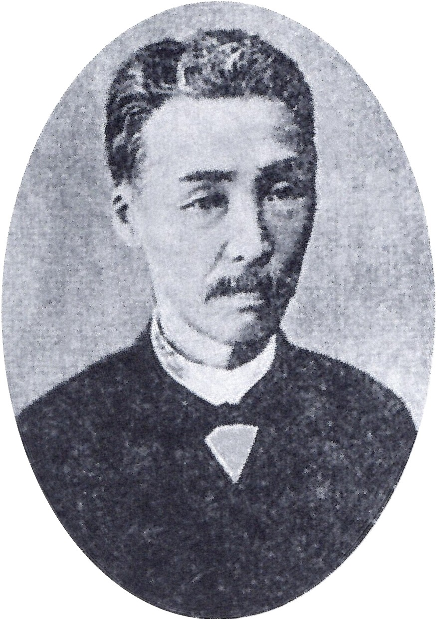 津軽承叙の肖像写真。